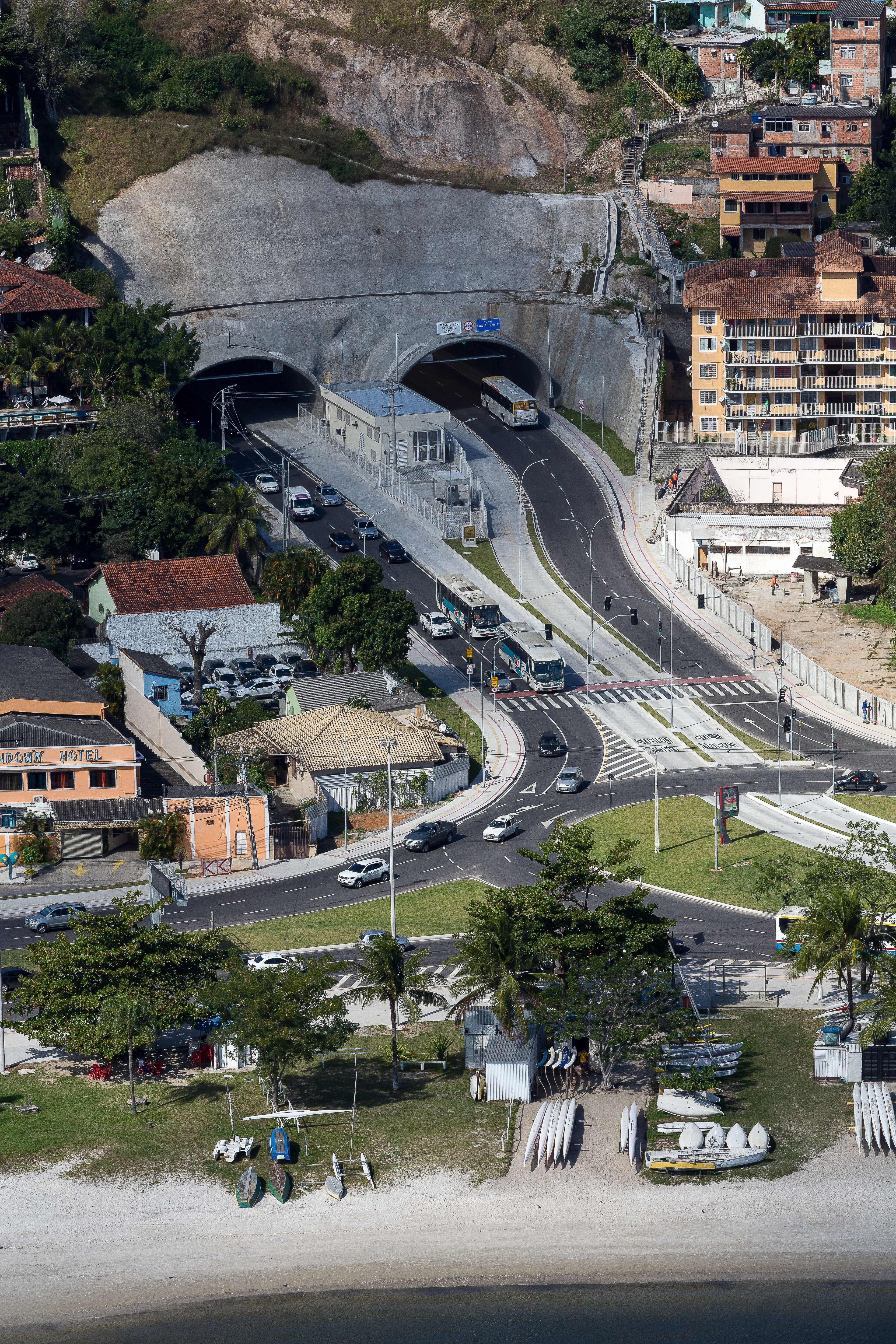 Vista aérea de um dos acessos ao Túnel Caritas - Cafubá, lado de Charitas. Niterói, RJ - Brasil.